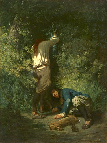 Deux hommes sont à l'affût. Ils portent une longue chevelure souvent attribuée aux Chouans. Chasseurs de lapins ou de troupes républicaines, ils semblent guetter de nouvelles proies.